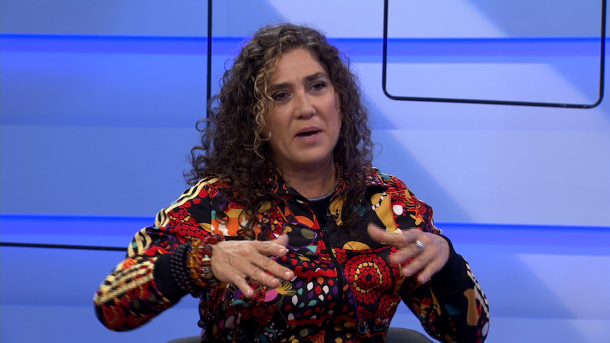 Anna Muylaert (São Paulo, 21 de abril de 1964) é uma roteirista e diretora de cinema e televisão brasileira.